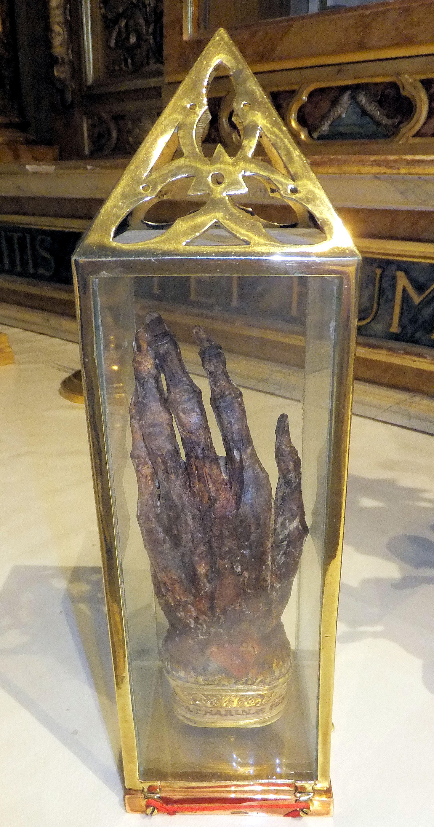 mano sinistra di santa Caterina da Siena, conservata nel monastero di Santa Maria del Rosario a Monte Mario, Roma